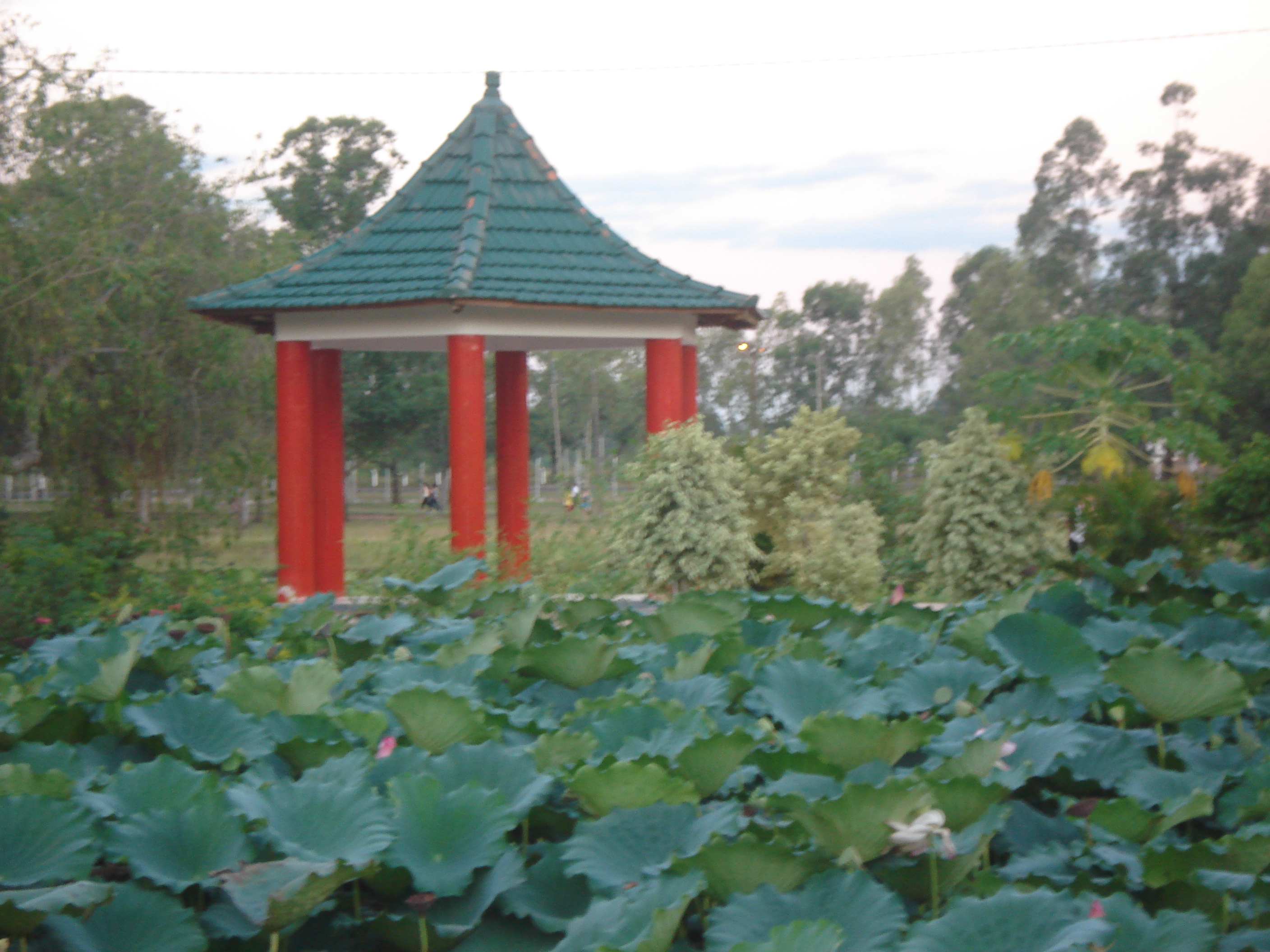 Ñu Guasu. Paraguay